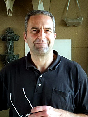 Thomas Torkler, Bildhauer und Architekt